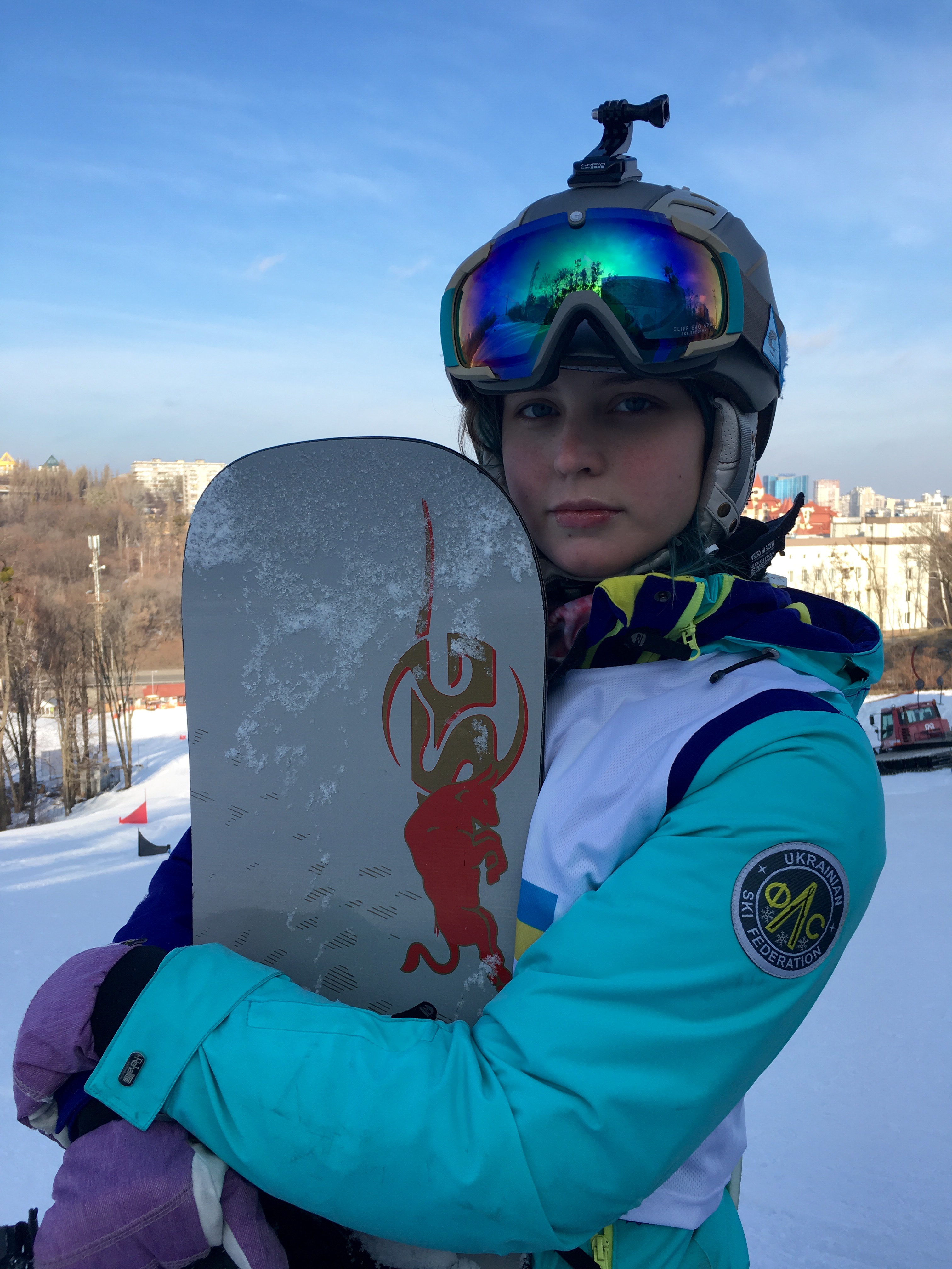 Кириченко Дарина Владиславівна